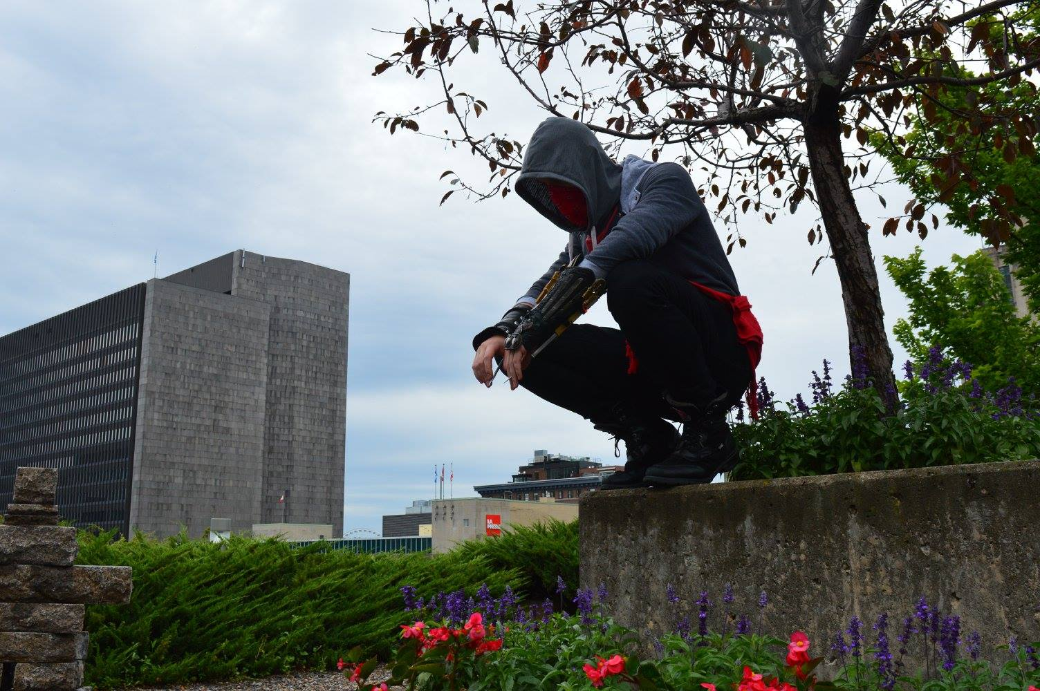 Cosplay basé sur le jeu vidéo Assassins Creed.